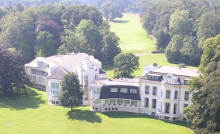 Landgoed Lauswolt te Beetsterzwaag